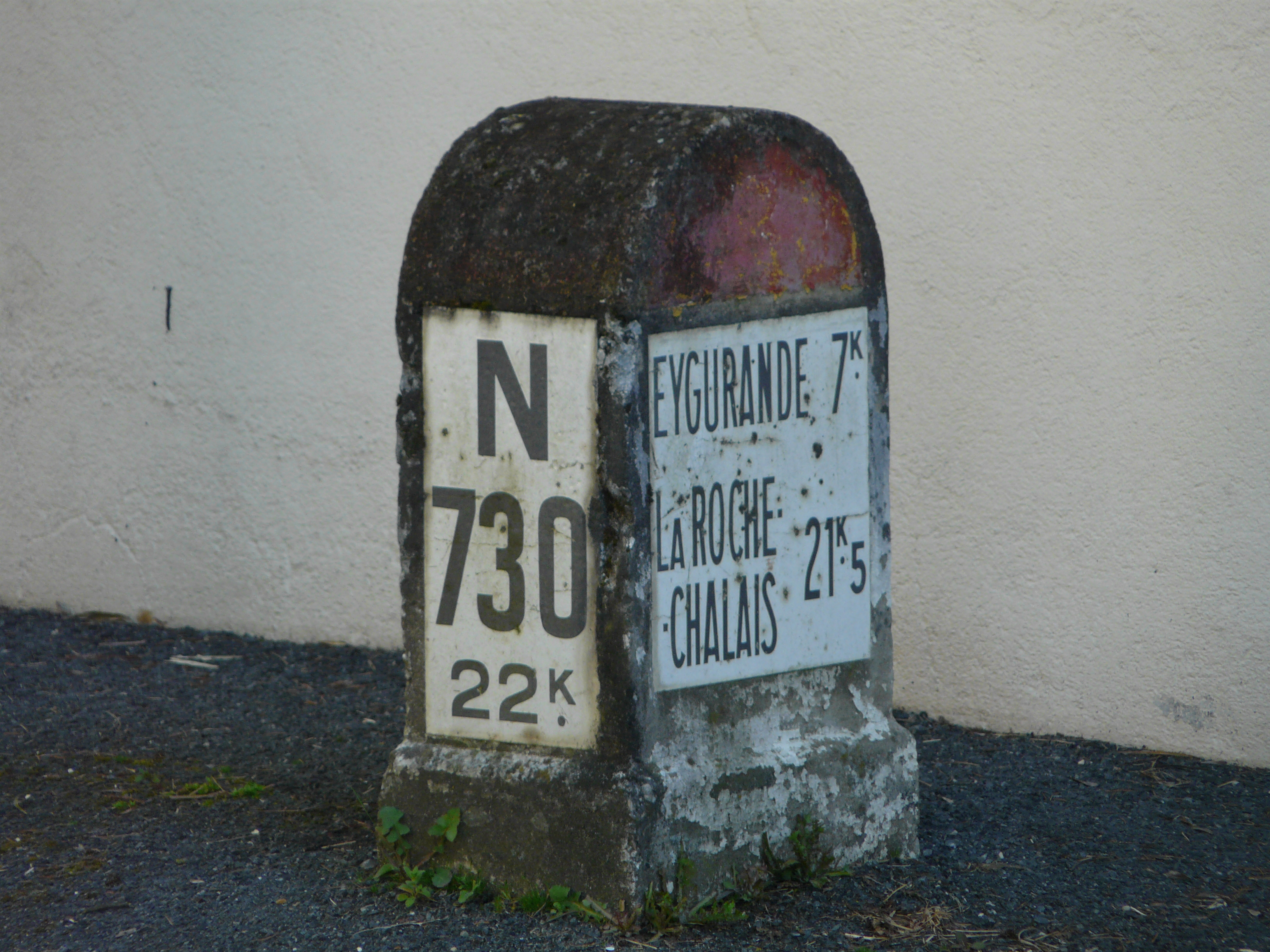 Borne de l'ancienne route nationale 730 à Ménestérol, Dordogne, France.